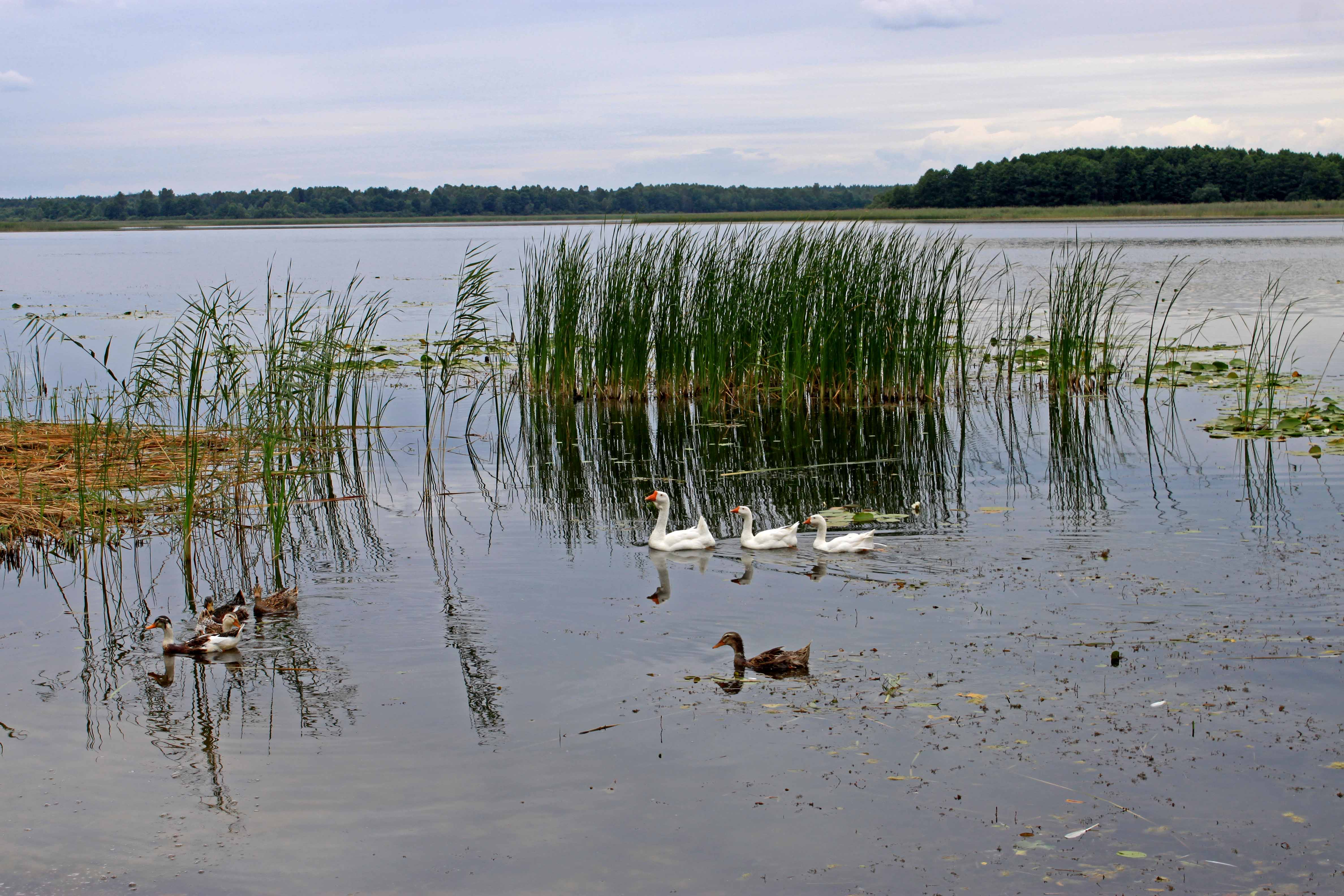 Заказник «Пулемецький»